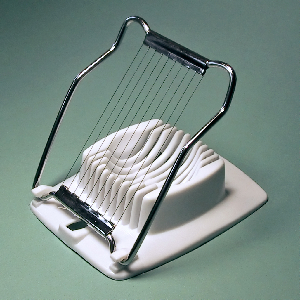 Eierschneider